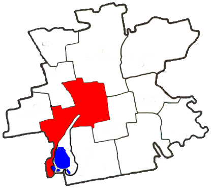 Апостолівська міська рада